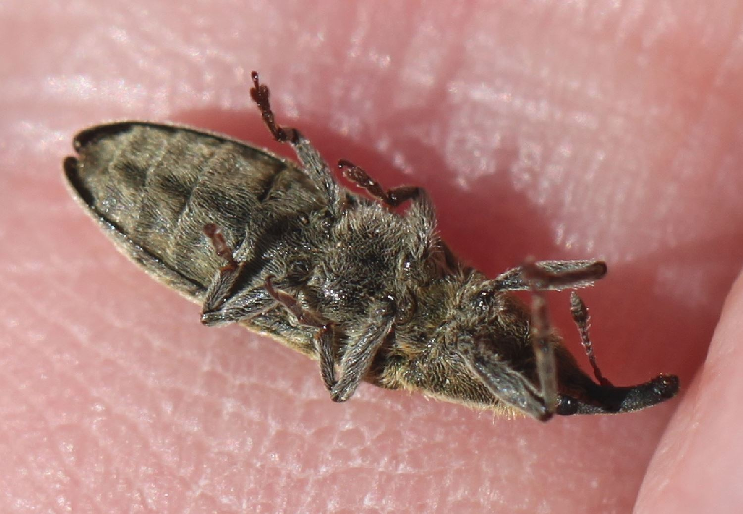 Rüsselkäfer Lixus filiformis am 15. Mai 2019 in Walldorf/Baden an Ackerkratzdistel